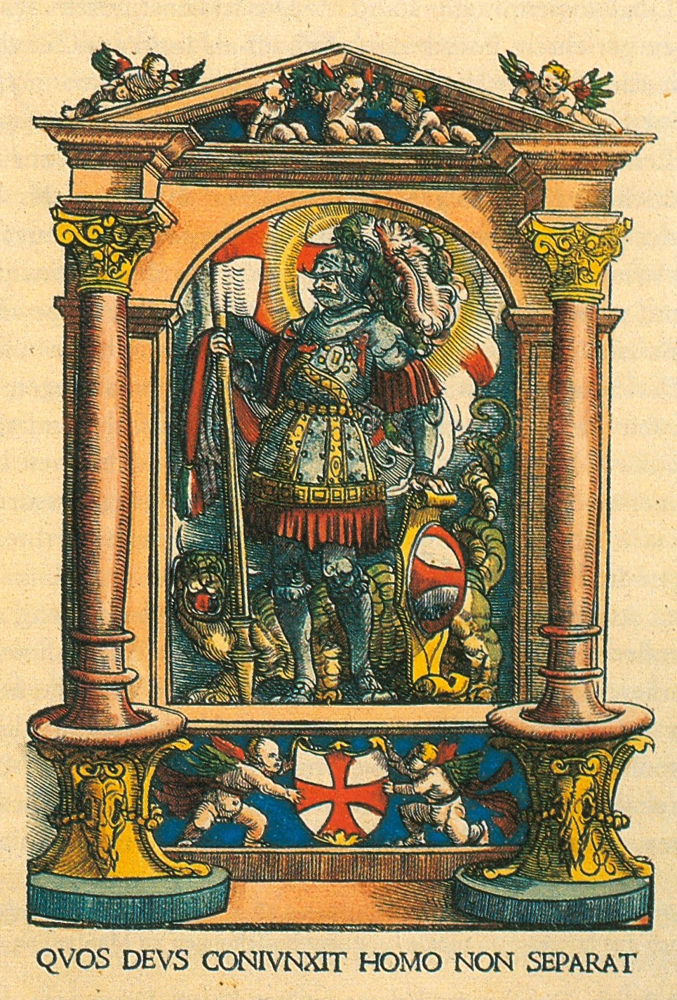 Wappenschild des Schwäbischen Bundes, 1522 Heiliger Georg mit Fahne. Zwei Putten halten das Wappen, ein rotes Kreuz in weißem Feld Das Motto: Wen Gott verbunden, trennt der Mensch nicht Kolorierter Holzschnitt Werkstatt Hans Burgkmairs eingescannt aus: Horst Carl: Der Schwäbische Bund 1488–1534. Landfrieden und Genossenschaft im Übergang von Spätmittelalter zur Reformation. Leinfelden-Echterdingen, 2000; ISDN 3-87181-424-5. S. 453